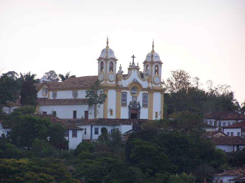 Igreja de Sto. Antônio, Tiradentes - MG, Brasil.